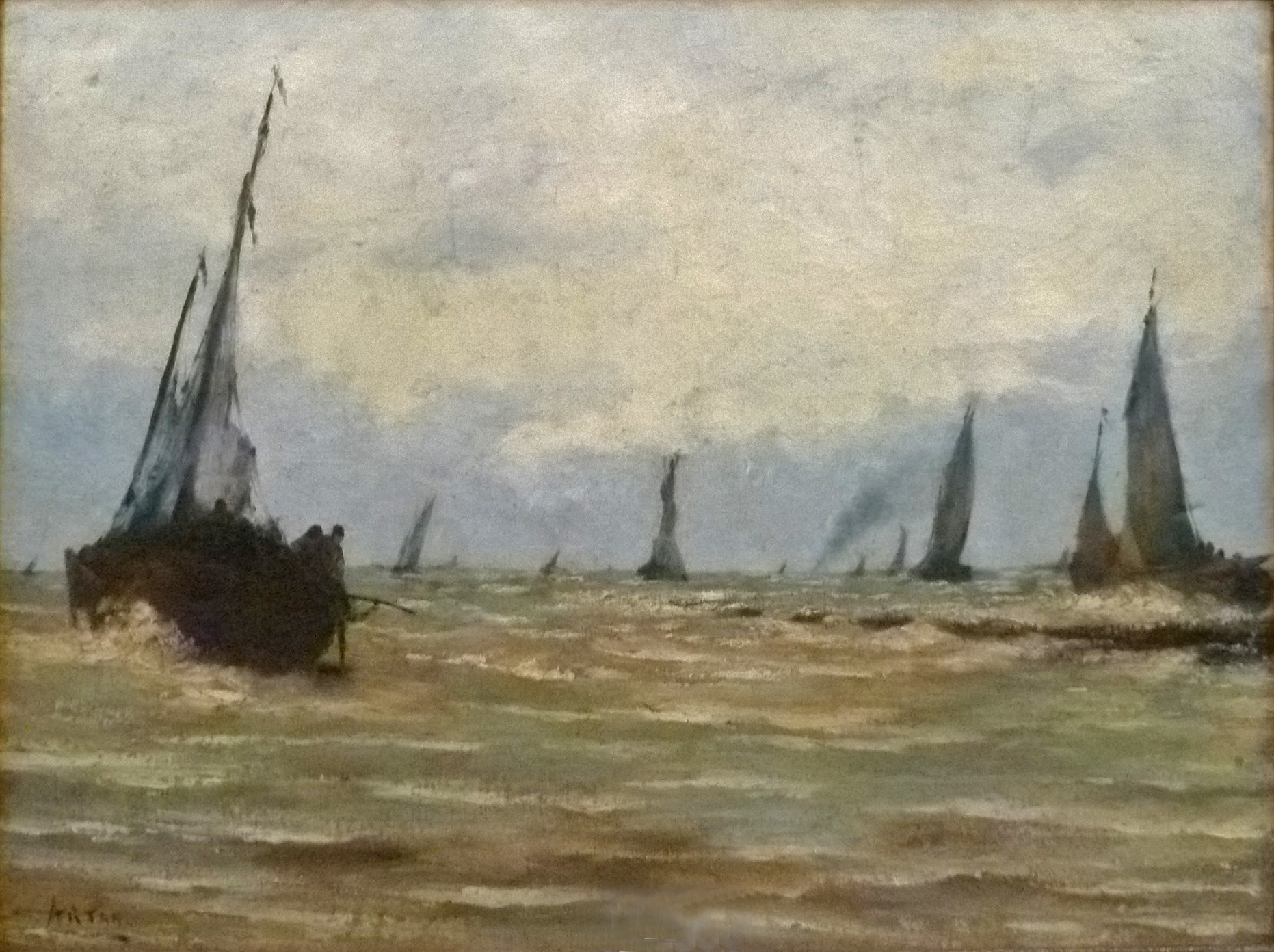 "Marine met vissersbootjes", olieverf op doek (50 x 65 cm) door de Belgische marineschilder Louis Artan (1837-1890); privécollectie